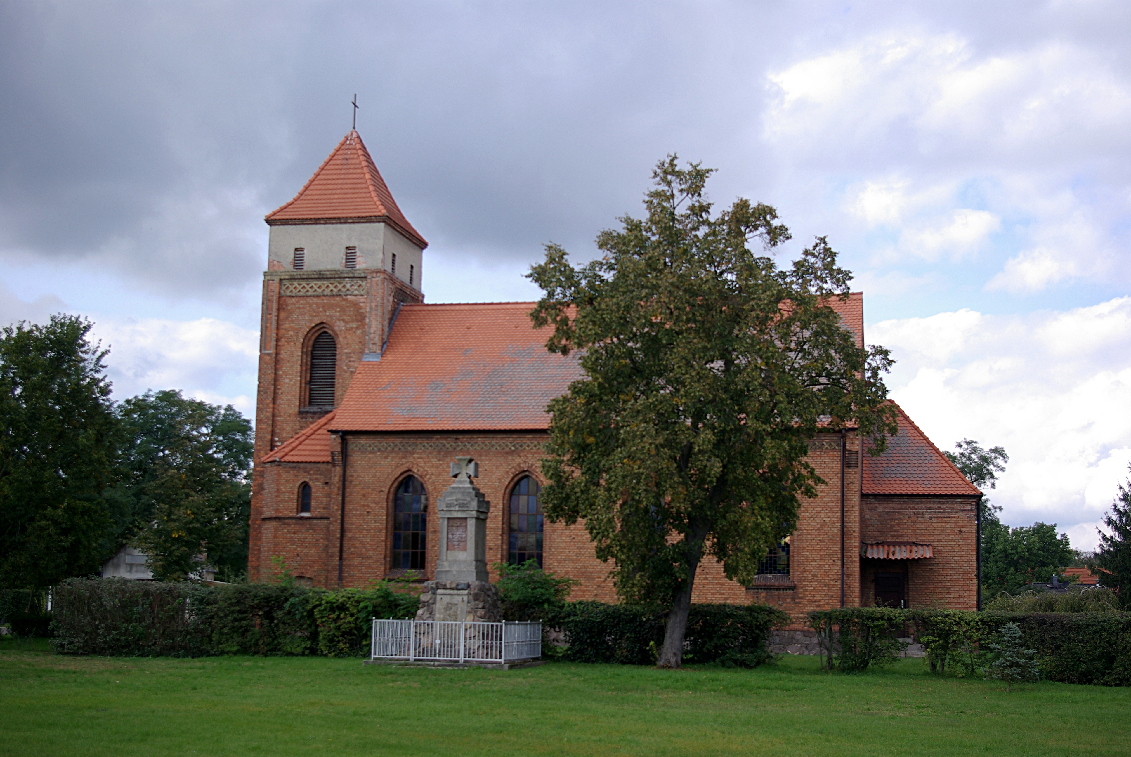 Bliesdorf in Brandenburg. Die Dorfkirche steht unter Denkmalschutz.